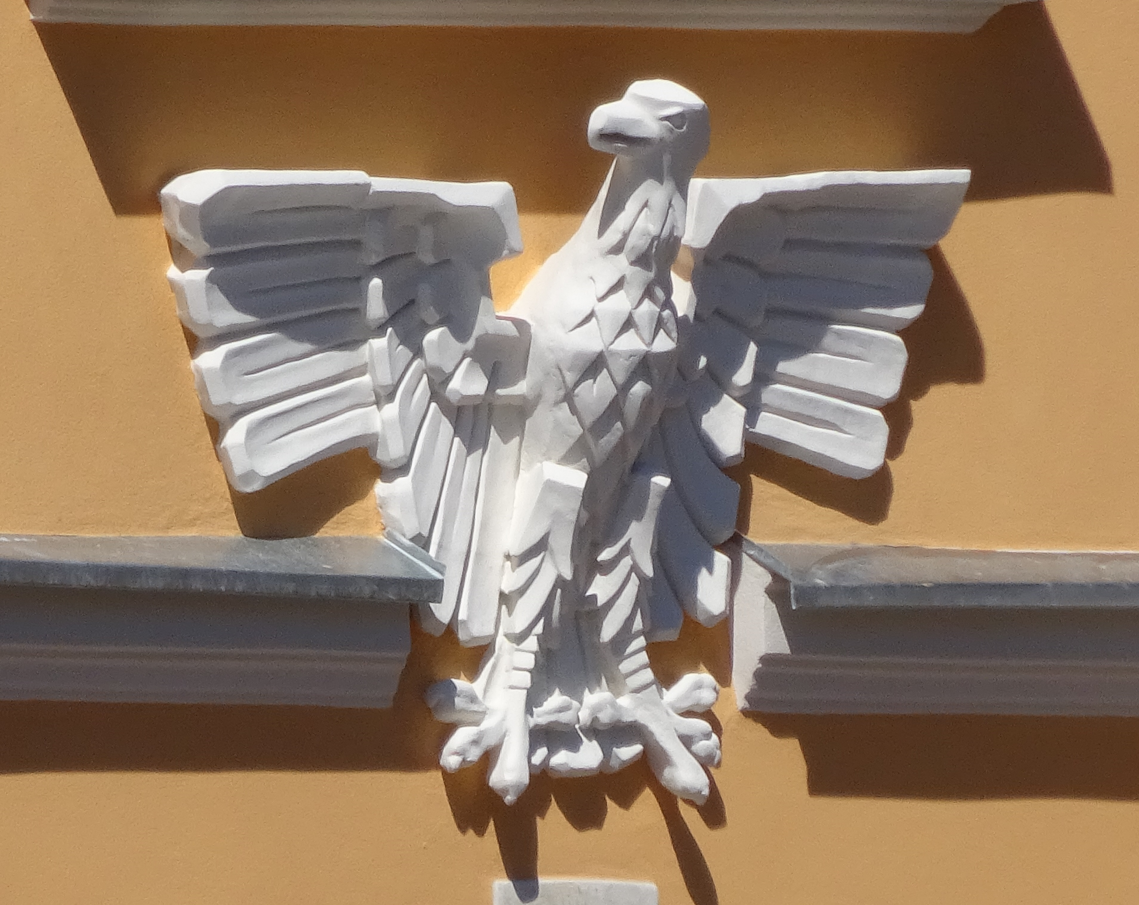 Płaskorzeźba orła białego nad bramą wjazdową do Dworku Pod Białym Orłem w Krakowie-Podgórzu przy Rynku Podgórskim 14 w Krakowie. Po wyczyszczeniu - 2017.